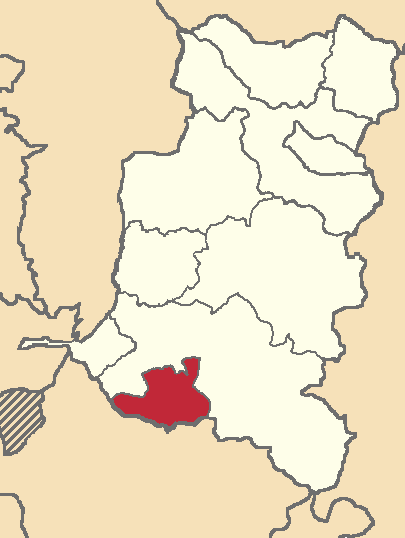 Mapa localizacor del cantón en Chimborazo, Ecuador